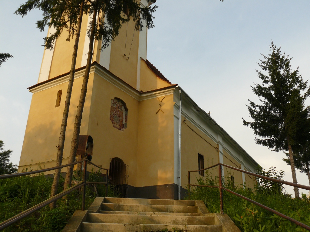 Biserica ortodoxă